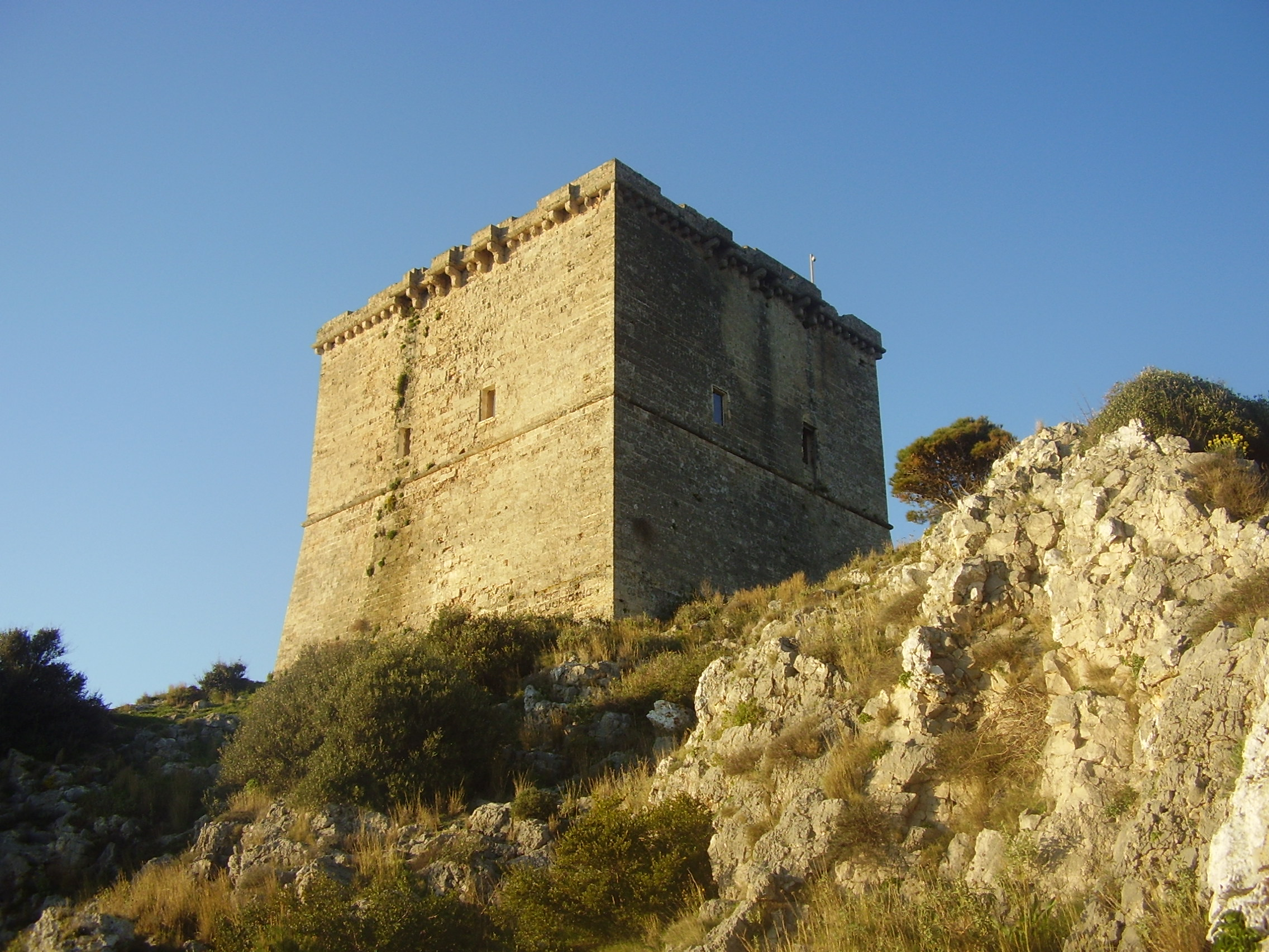 Torre Santa Maria dell'Alto Nardò